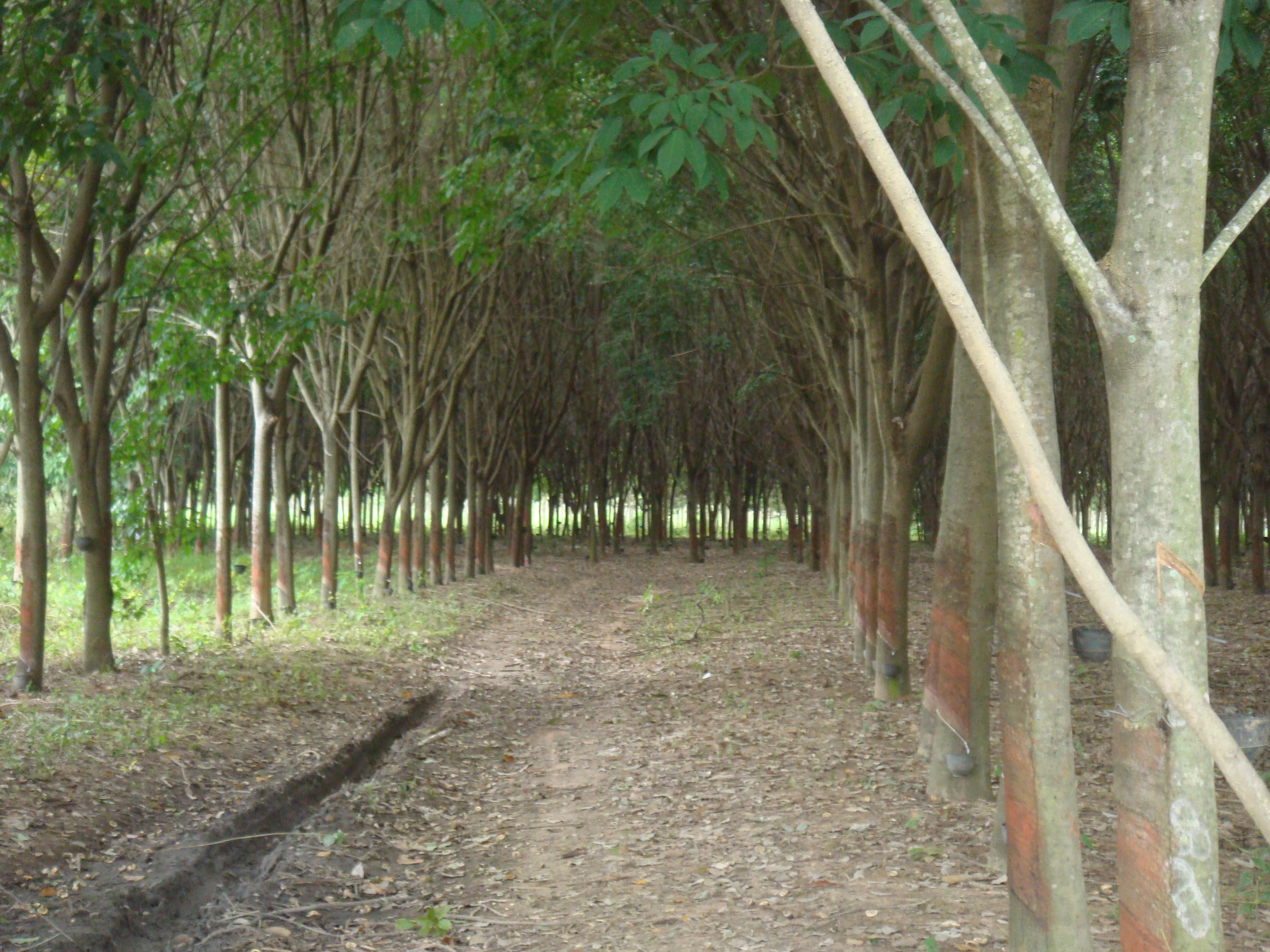 タイのゴム園 Rubber tree plantation Thailand